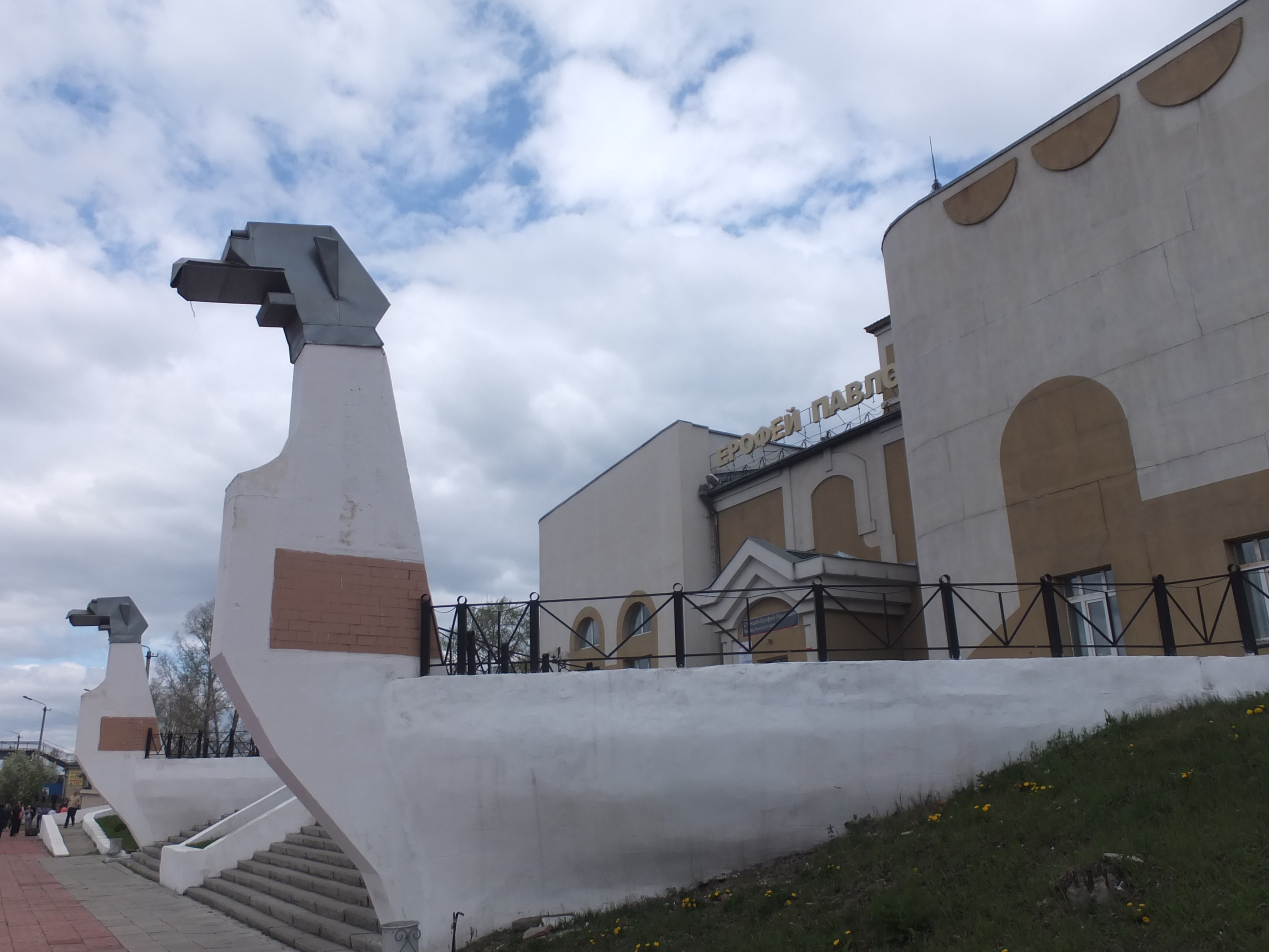 Bahnhof Jerofei Pawlowitsch (Streckenkilometer 6895 der Transsibirischen Eisenbahn)